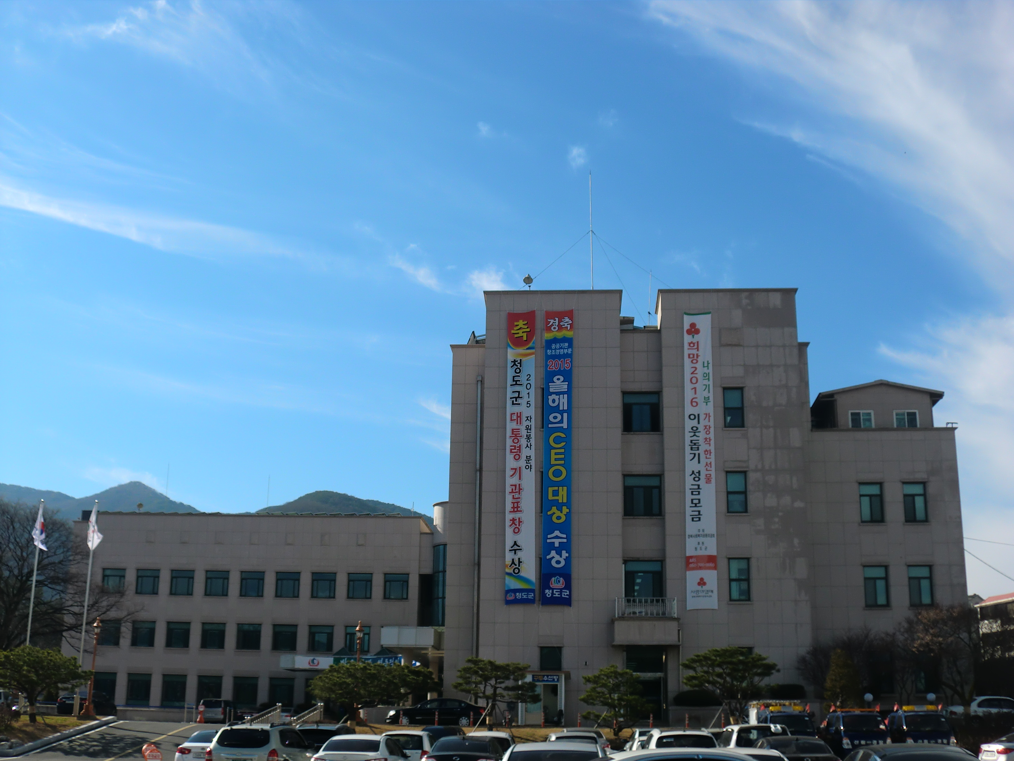 경상북도 청도군에 있는 청도군청